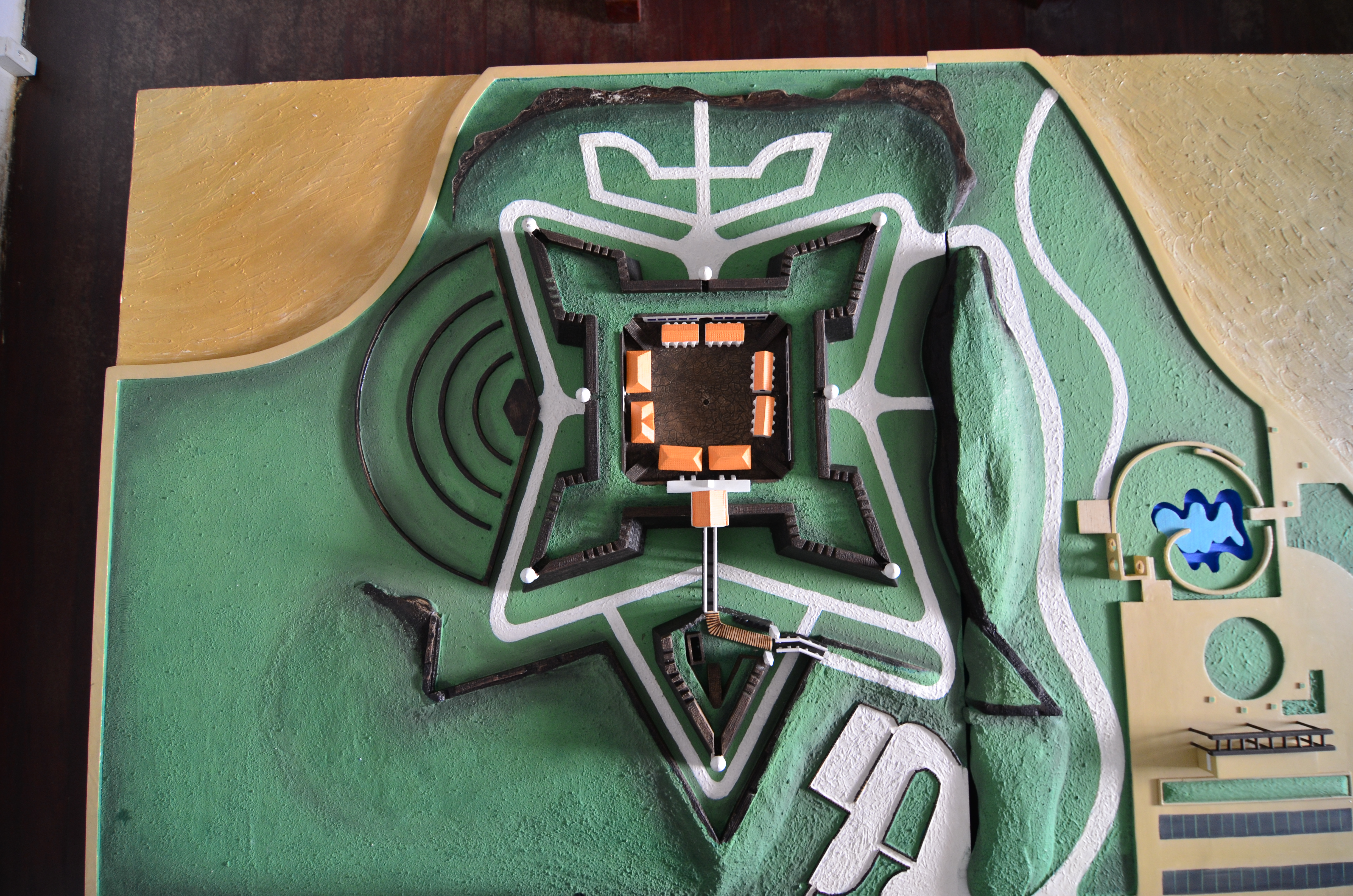 Fortaleza de São José de Macapá